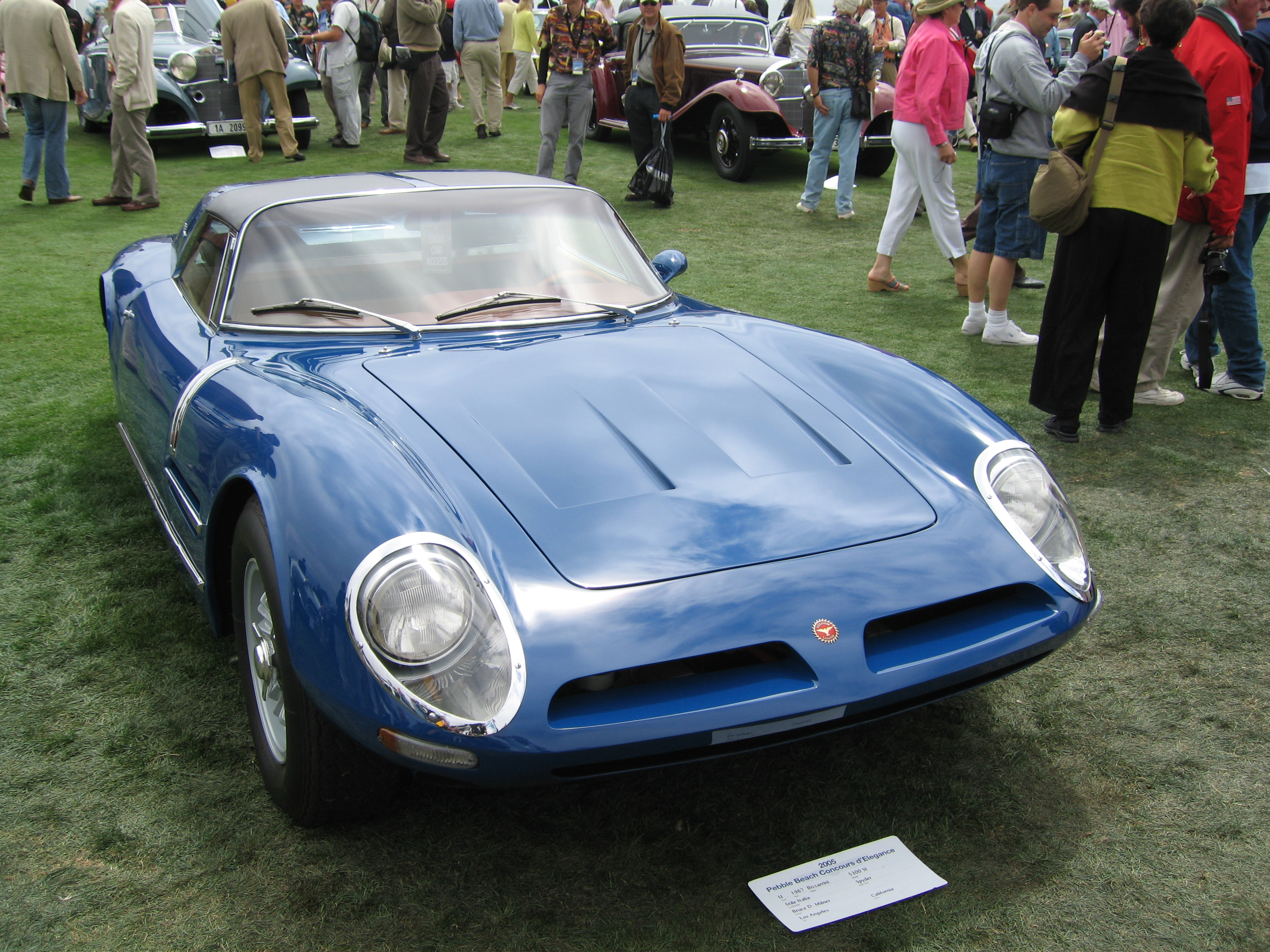 2005 Pebble Beach Bizarrini 5300 SI Spyder 1967